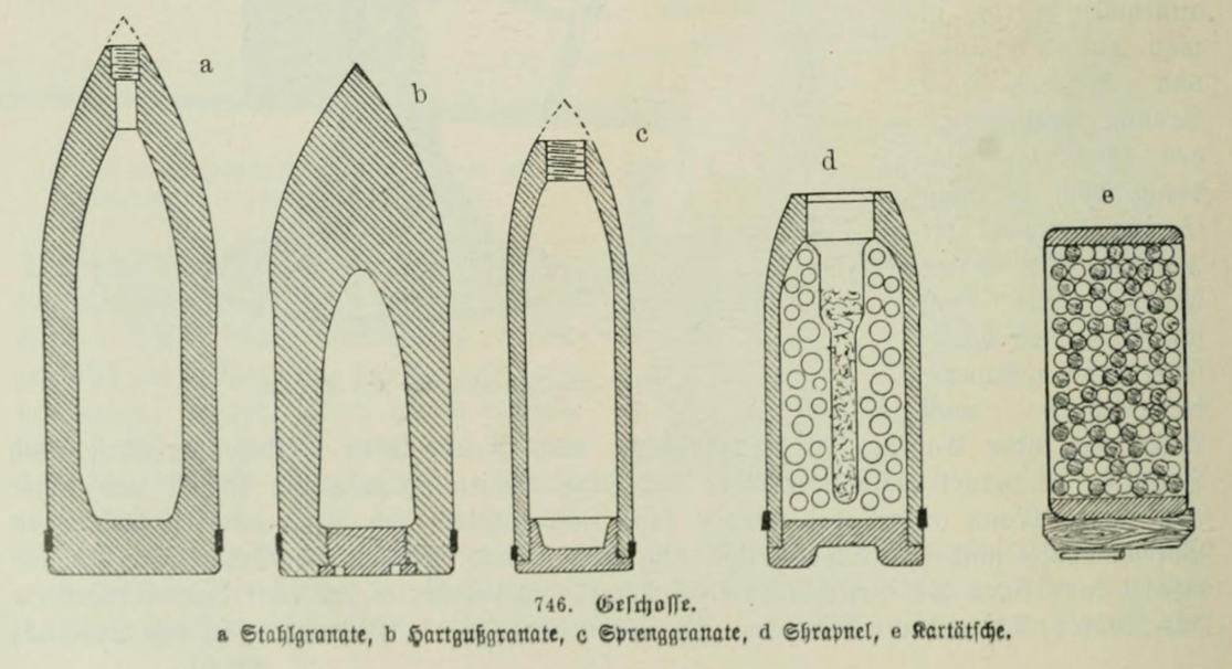 proyectiles de artilleria a fines del siglo XIX